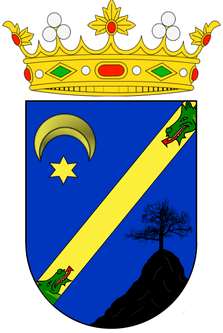 Escudo de armas del marquesado de Selva Alegre